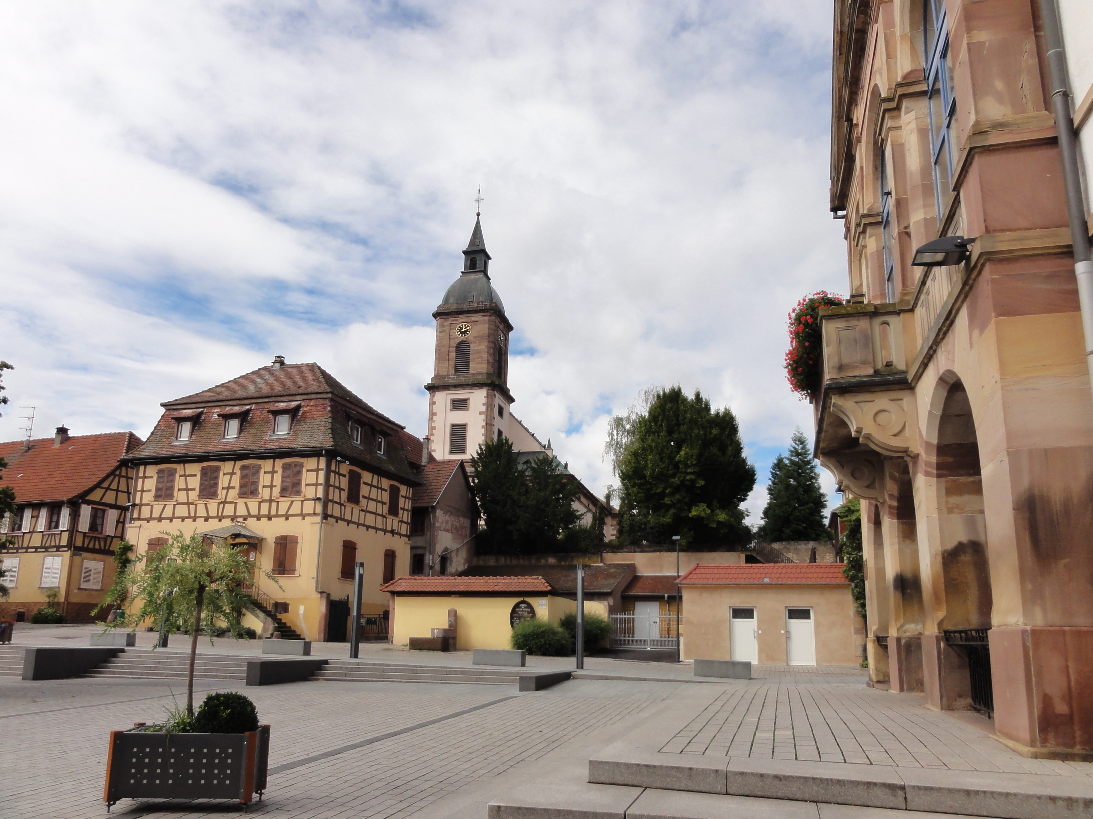 Alsace, Bas-Rhin, Epfig, Église Saint-Georges à partir de la place de la mairie.